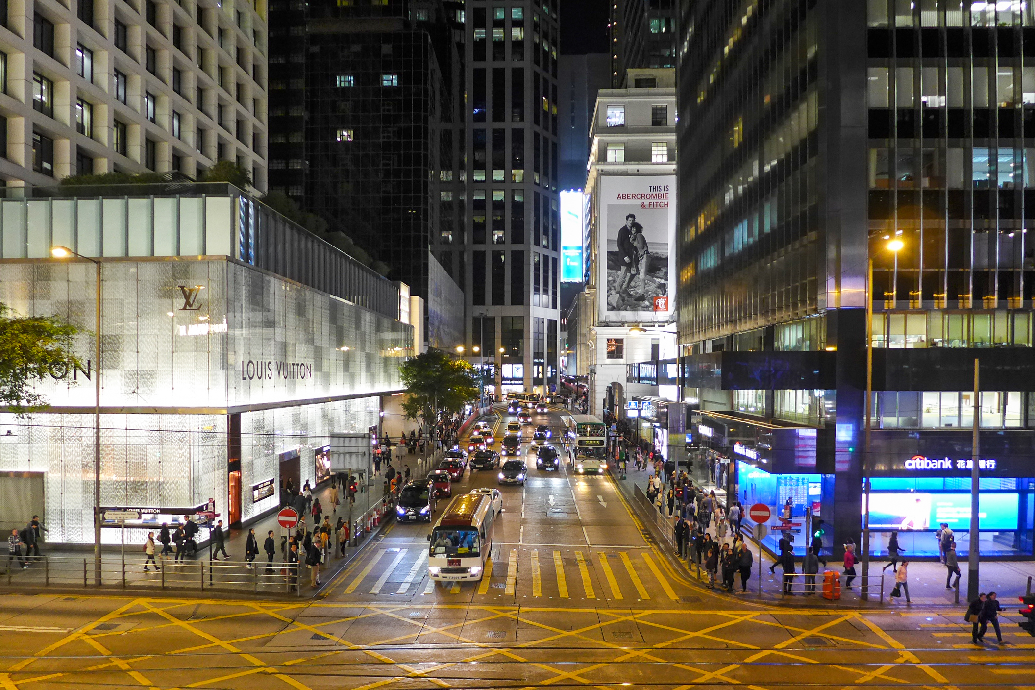 Pedder Street